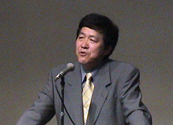 鉄道評論家の川島令三氏。